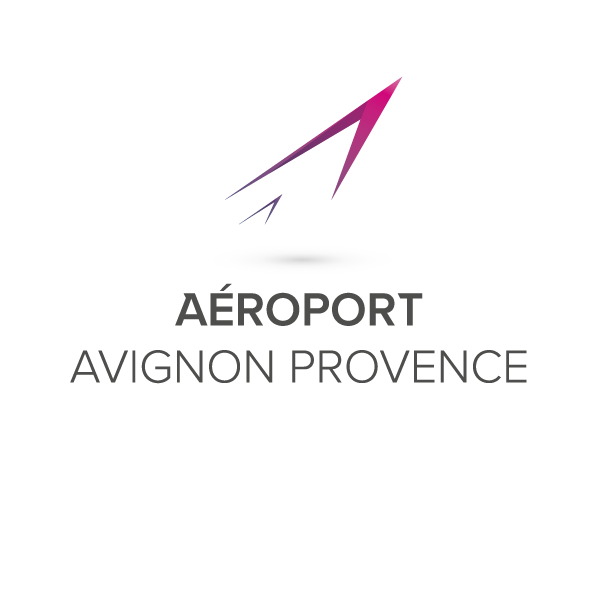 Logo de l'aéroport Avignon Provence depuis 2019.